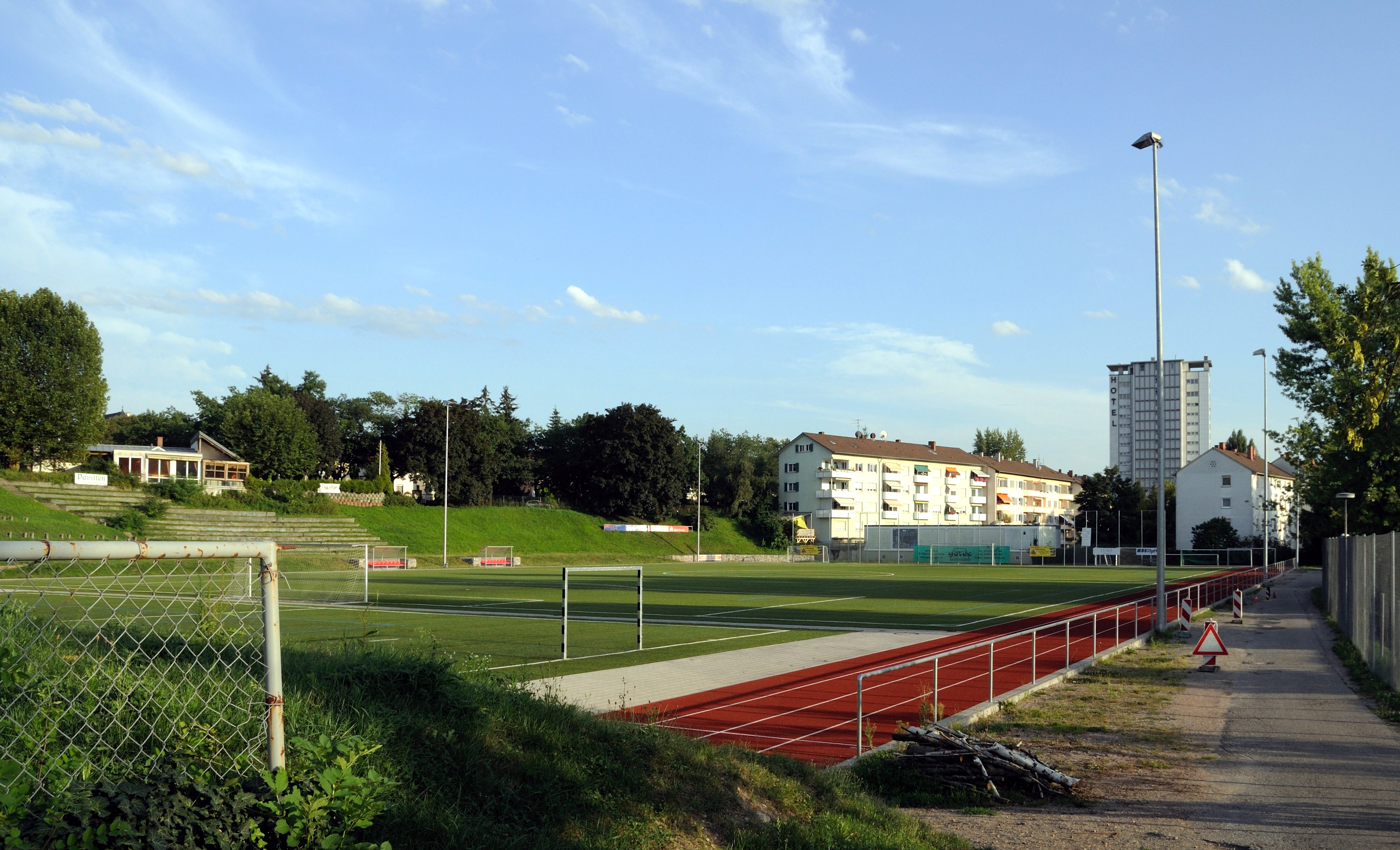 Lörrach: TuS-Stadion in Stetten